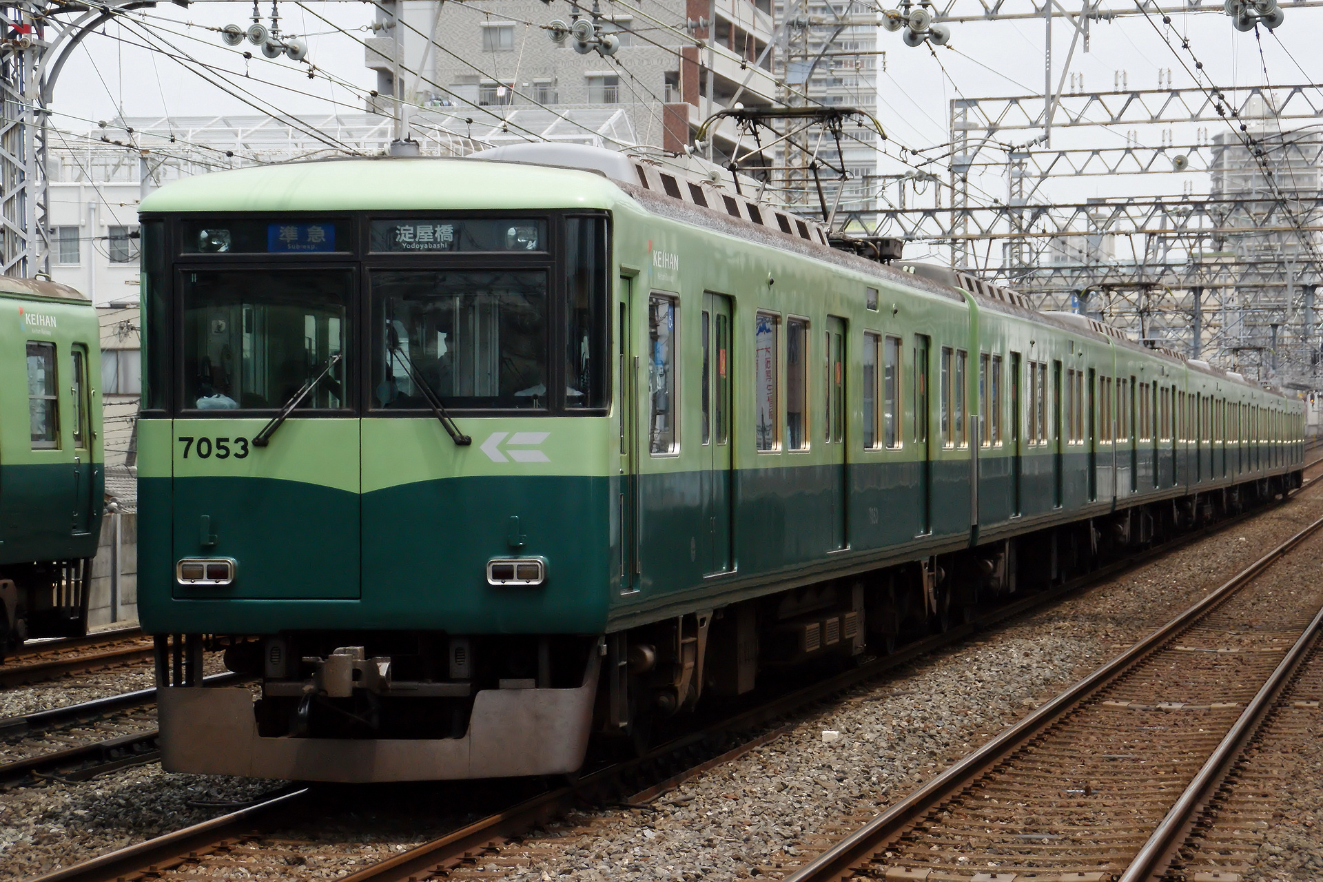 旧塗装の京阪7000系（2011年5月13日、京阪本線・土居）